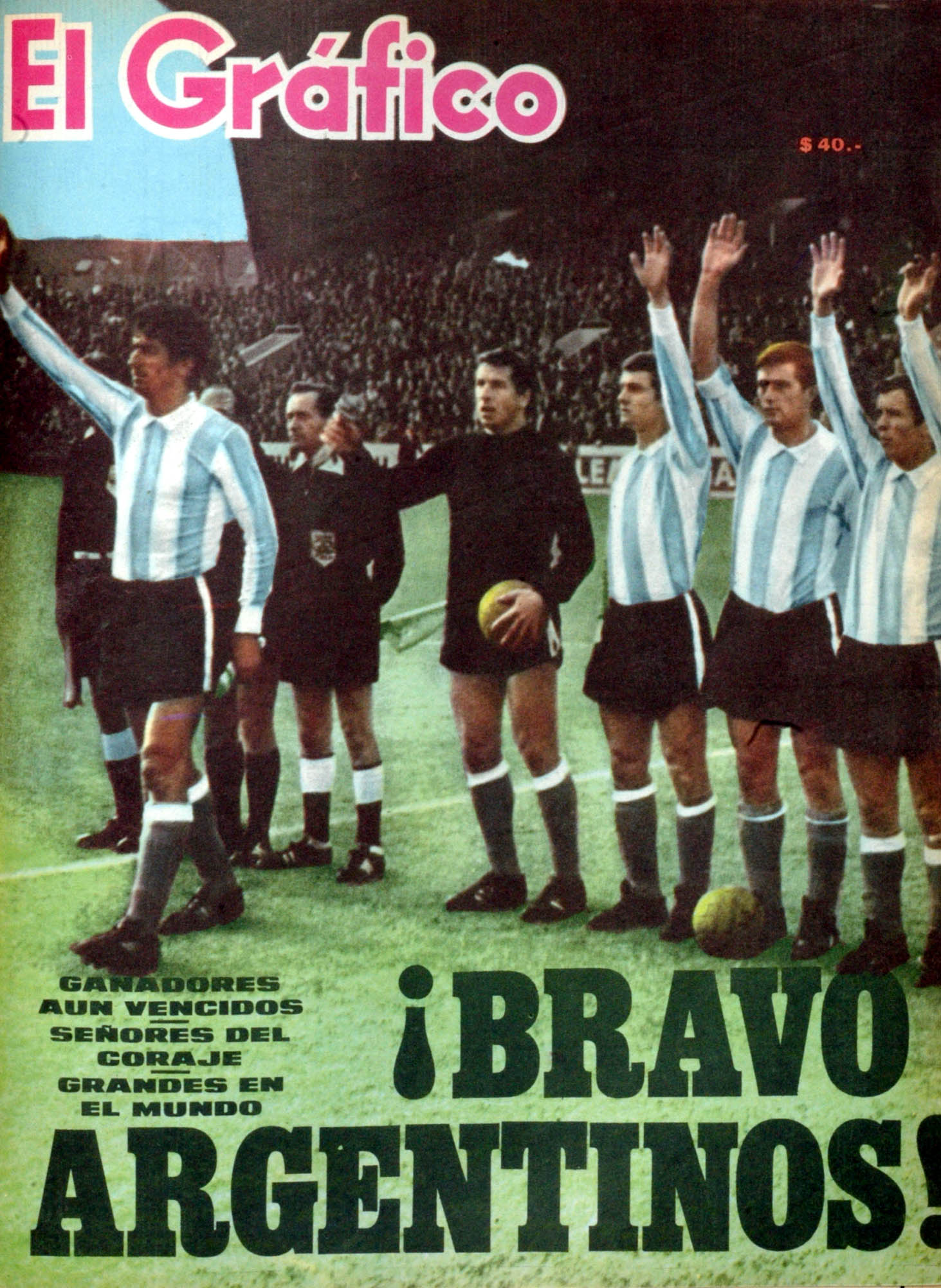 El Grafico del 26 de Julio de 1966. Edicion 2442